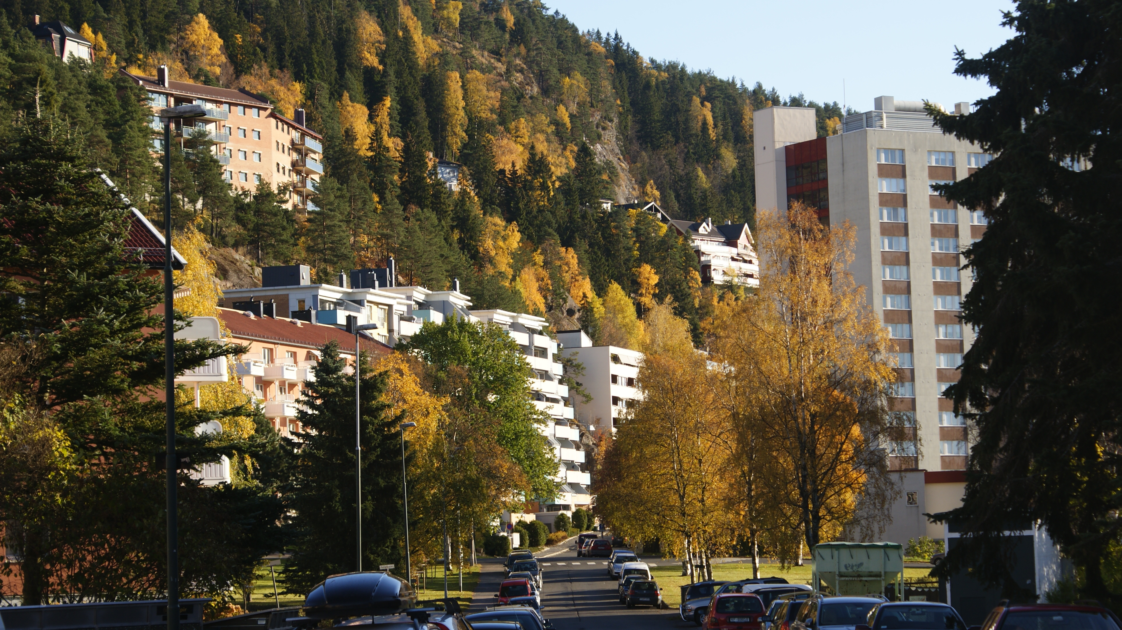 Kurveien, Kjelsås, Nordre Aker, Oslo. The urbanized slope of Lachmannsfjell.